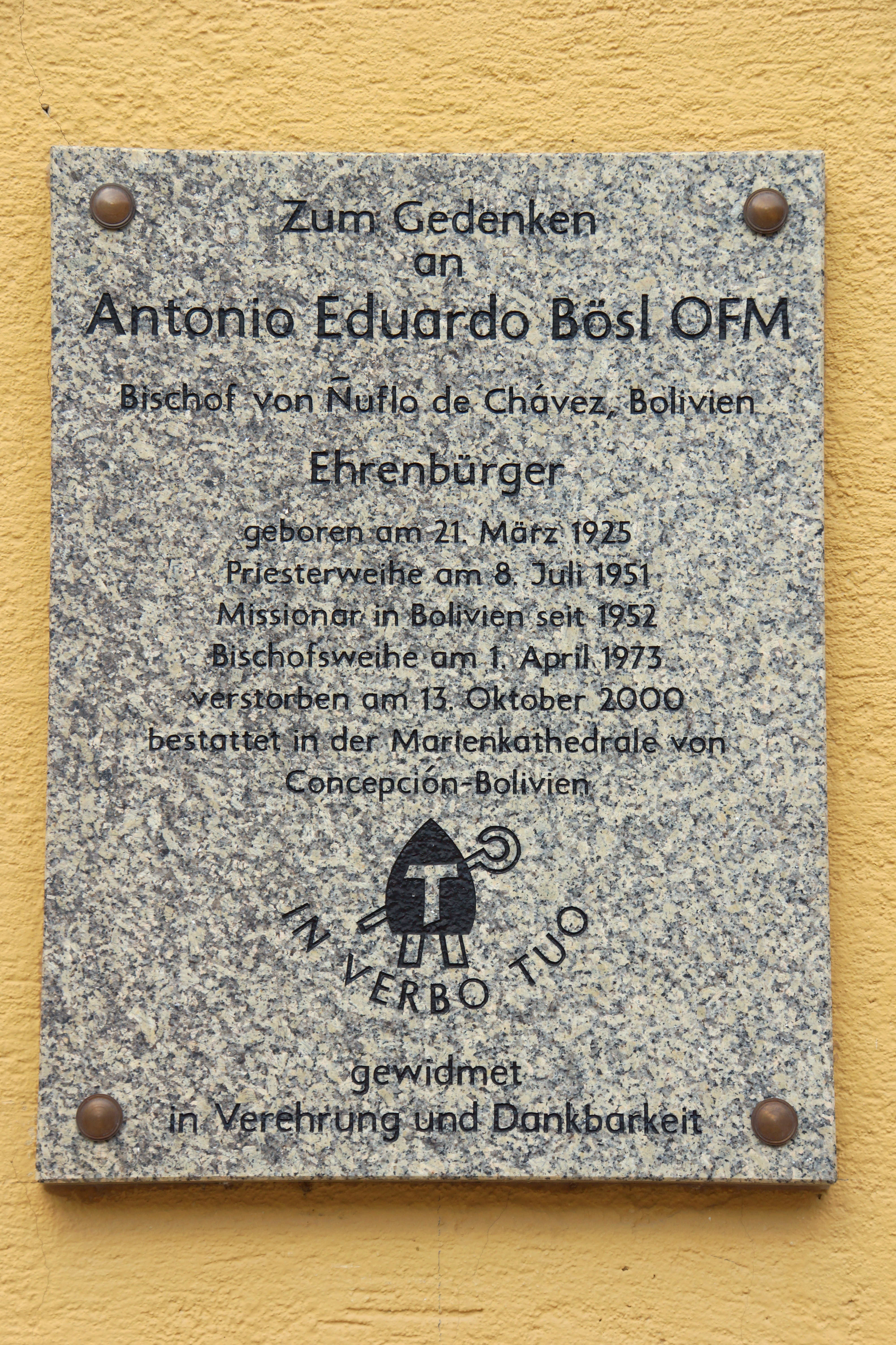 Die katholische Pfarrkirche Mariä Himmelfahrt in Hirschau in der Oberpfalz